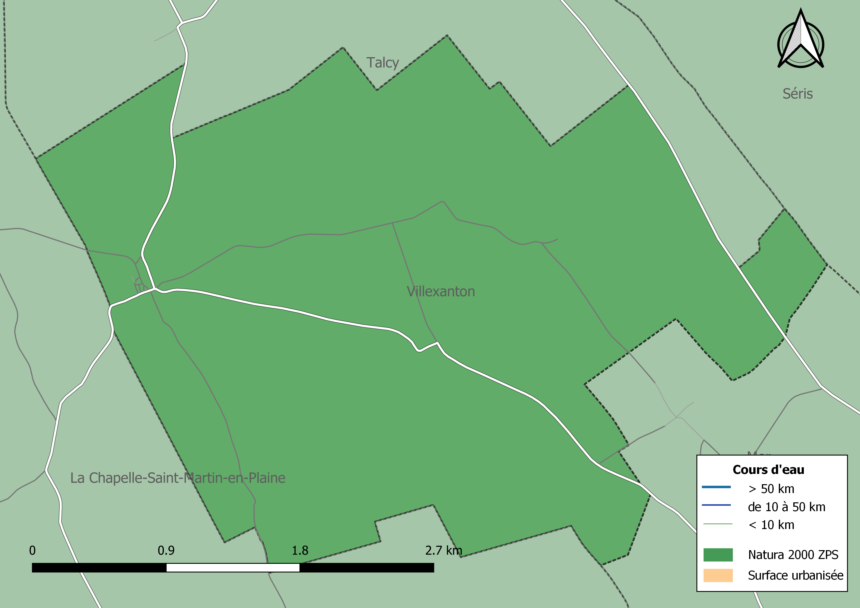 Carte du site Natura 2000 de type ZPS de la commune de Villexanton (France).